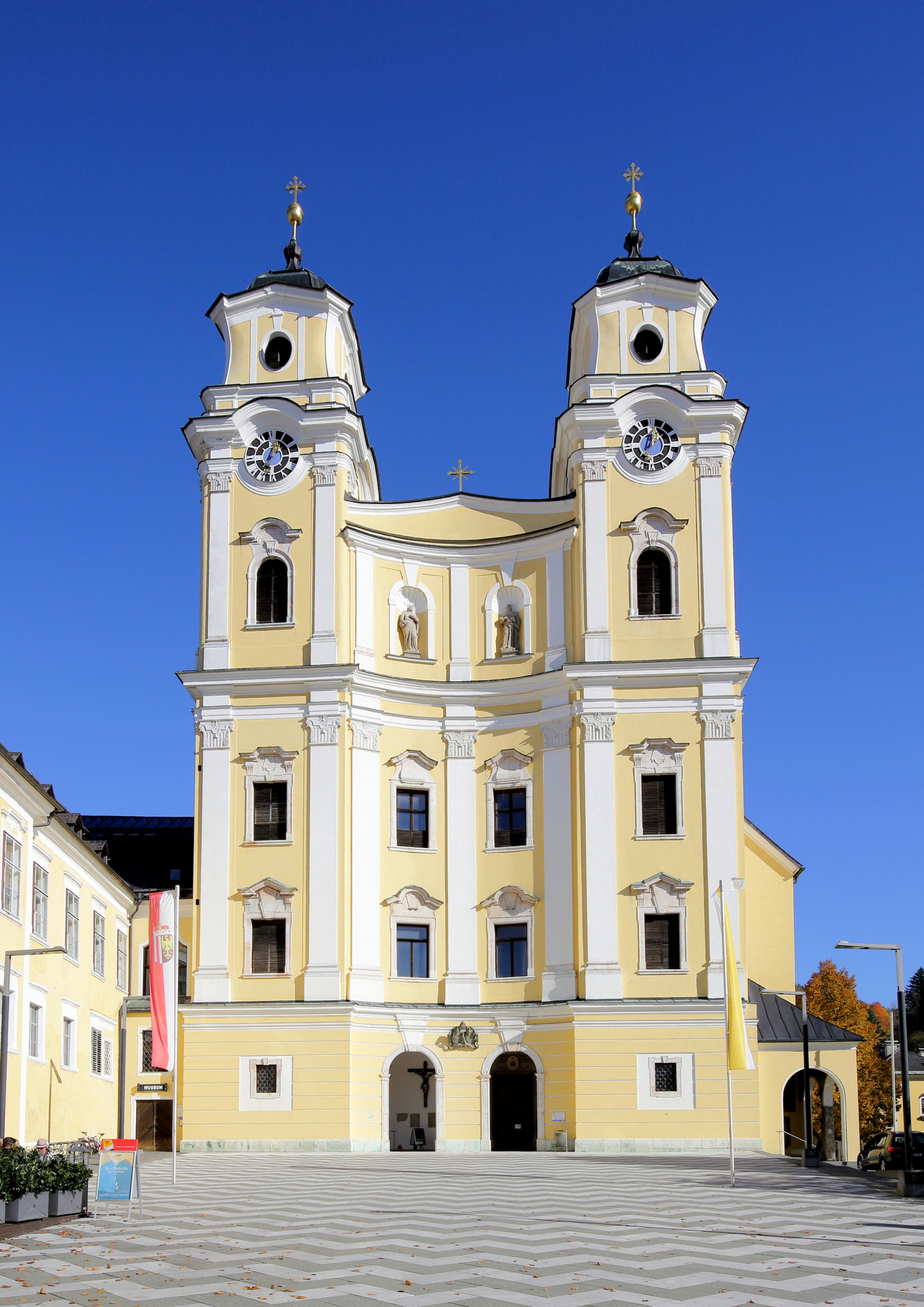 Westansicht der Basilika und ehemalige Klosterkirche in der oberösterreichischen Marktgemeinde Mondsee.Die ehemalige Klosterkirche wurde ab 1470 im gotischen Stil errichtet und 1487 geweiht. In der Mitte des 18. Jahrhunderts erfolgte eine Umgestaltung der Fassade, der Türme und des Hauptportals. Nach einem verheerenden Ortsbrand im Jahr 1774, dem unter anderem das Kirchendach zu Opfer fiel, dürften weitere Veränderungen vorgenommen worden sein. Im Jahr 1791 wurde das Kloster aufgelöst und die Kirche erhielt den Status einer Pfarrkirche; 2005 wurde sie zur Basilika Minor erhoben.